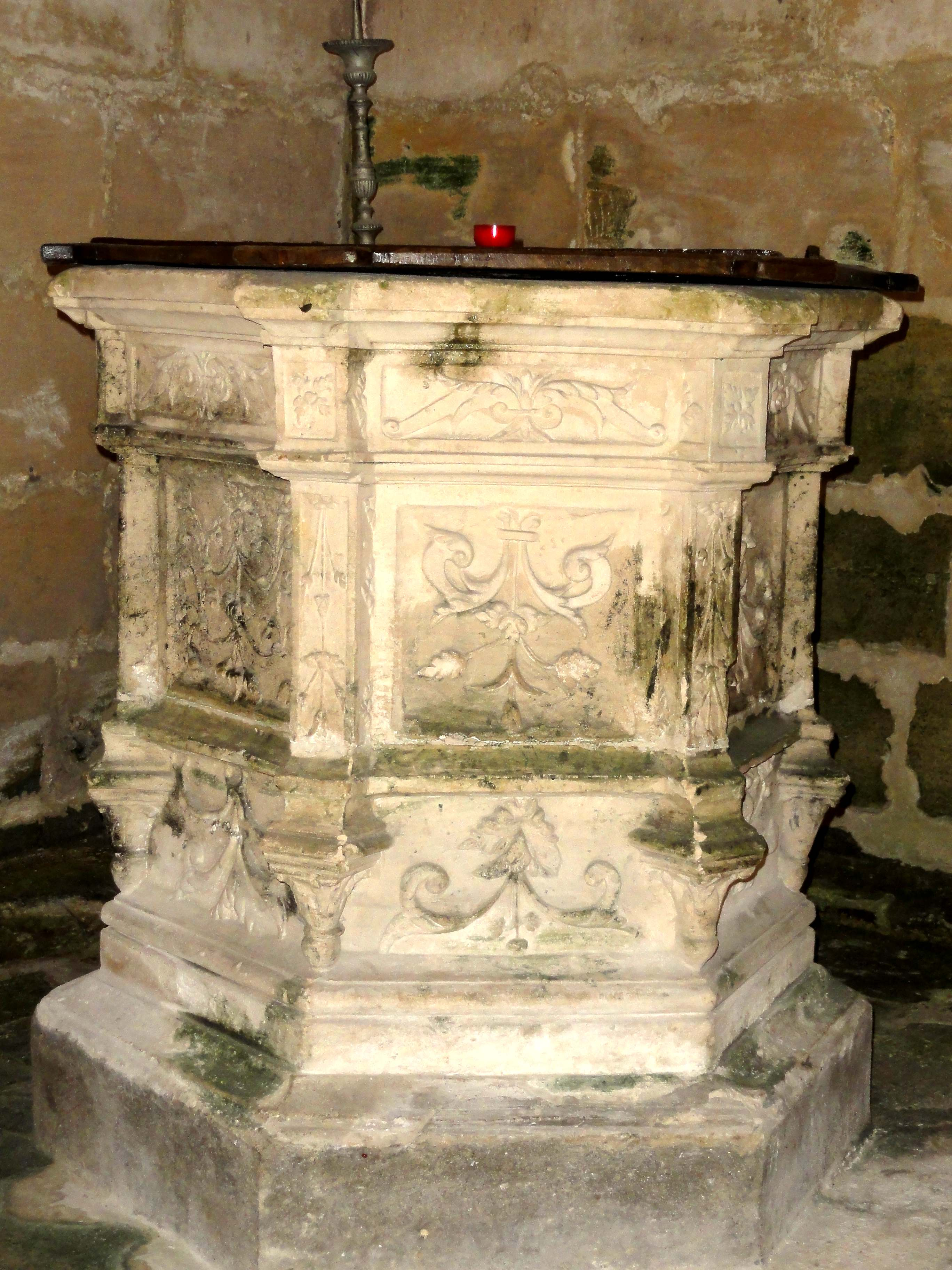 Fonts baptismaux du XVIe siècle.